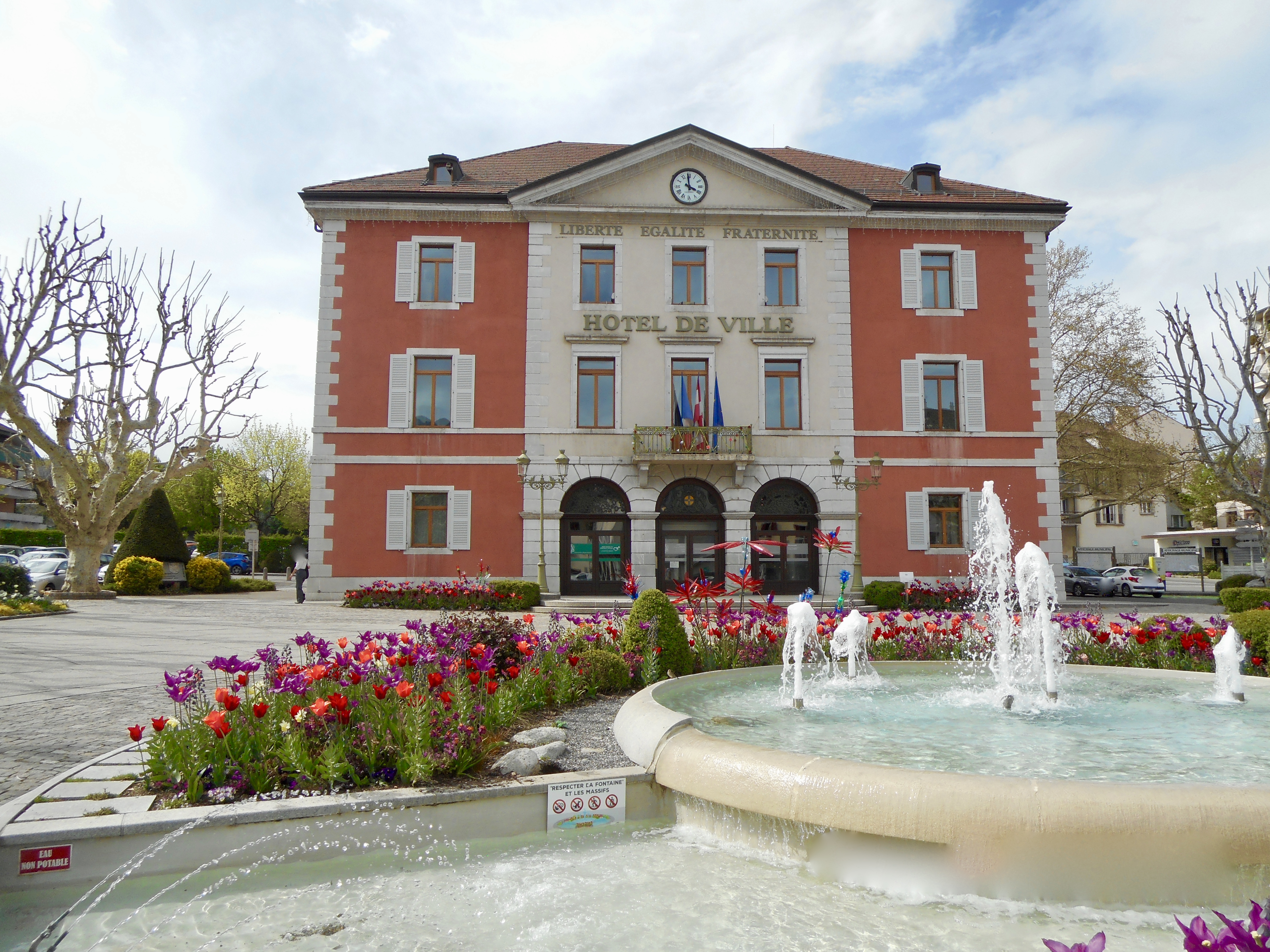 Mairie de La Roche-sur-Foron, printemps 2019.